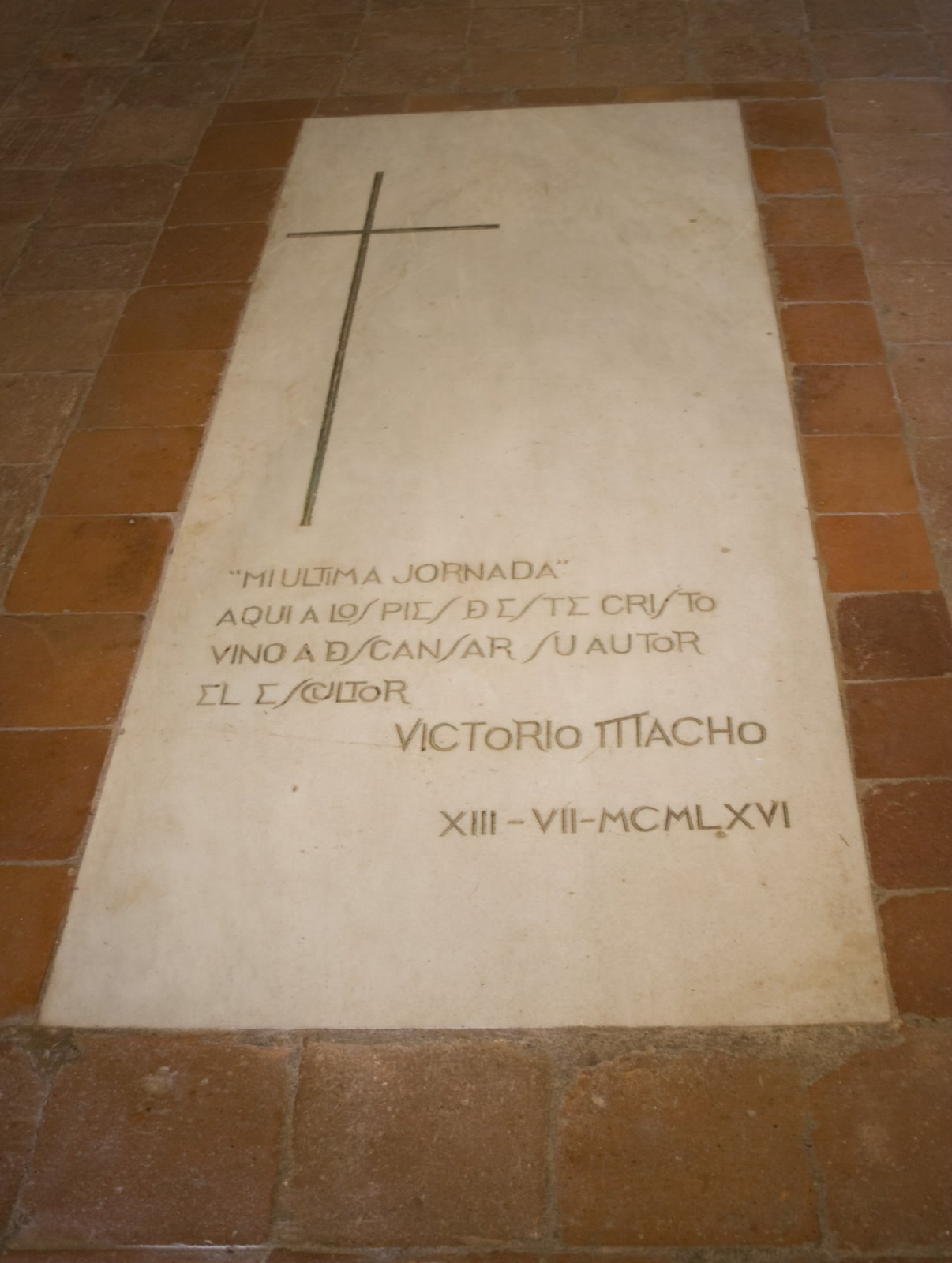 Es la lapida del artista palentino